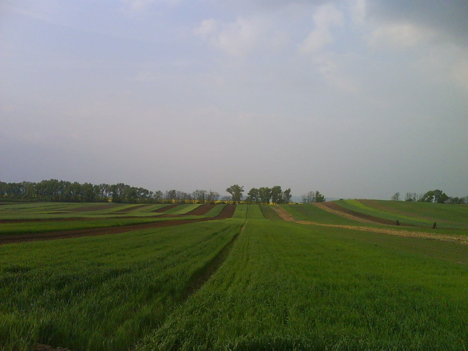 Rét Csomádon